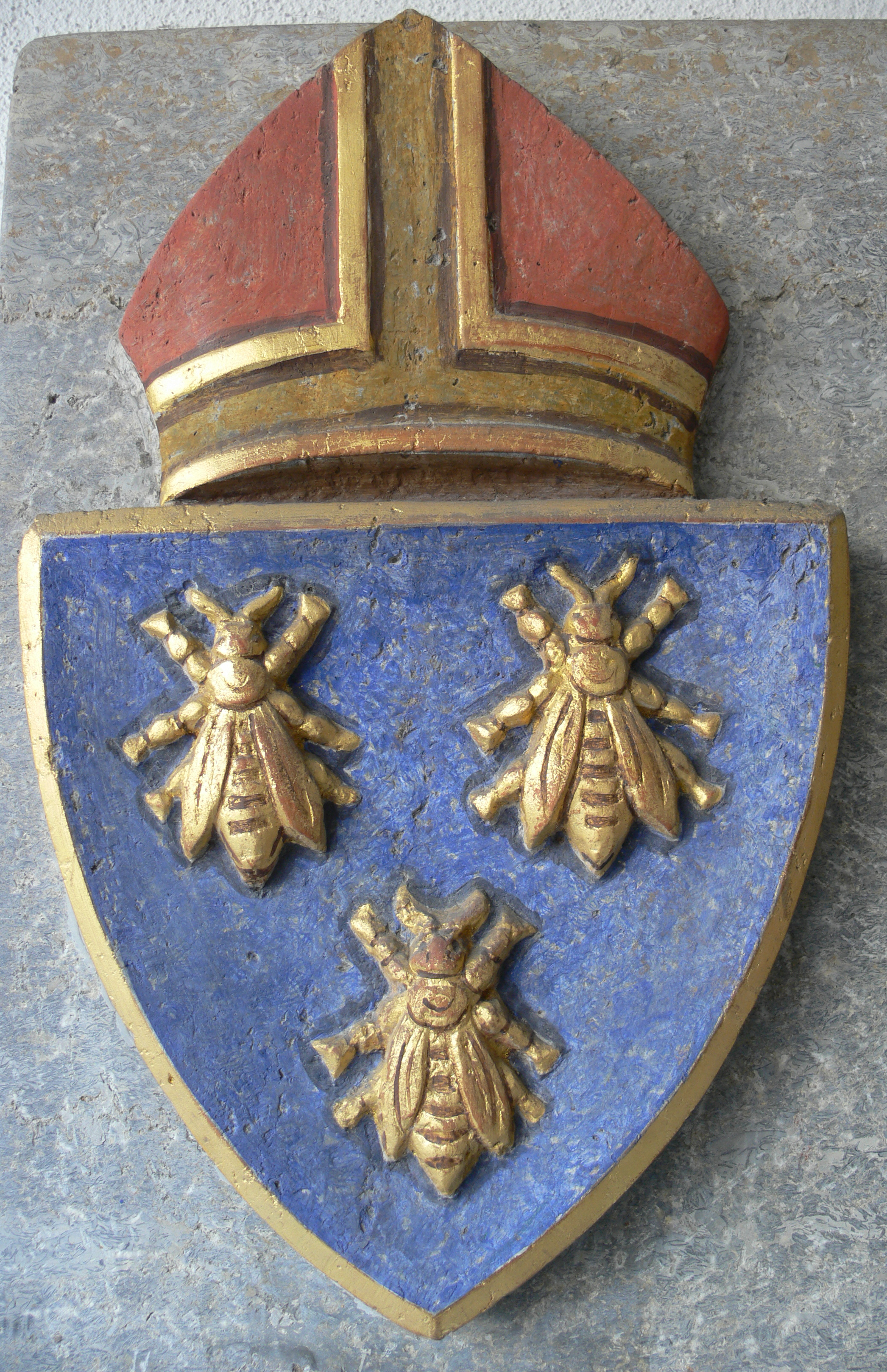 Ravensburg, Herrenstraße 38, Abtswappen an einer Gedenktafel. Der Vorgängerbau (das katholische Gesellenhaus) war das Geburtshaus des Beuroner Abts Raphael Walzer.